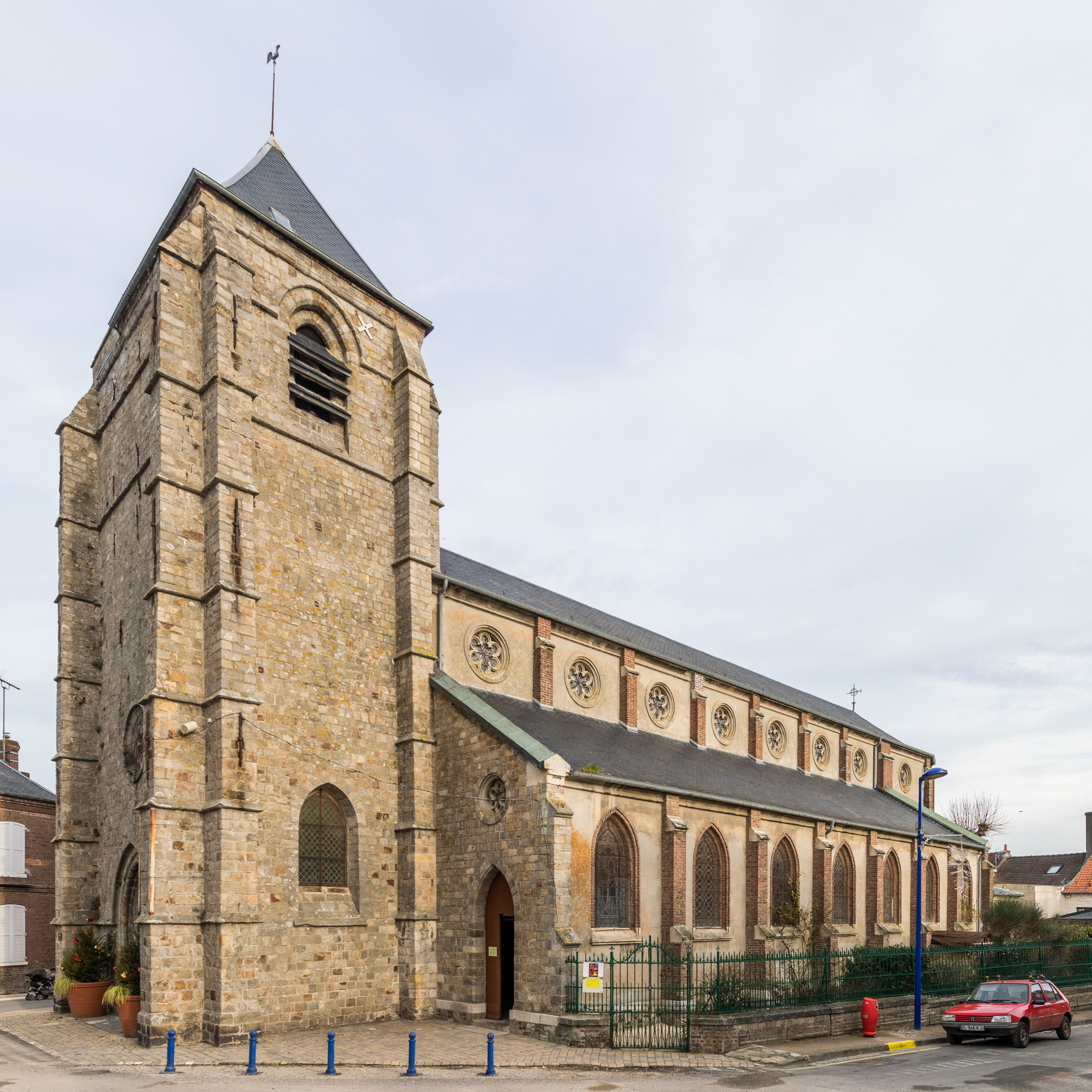 Église Saint-Pierre du Crotoy